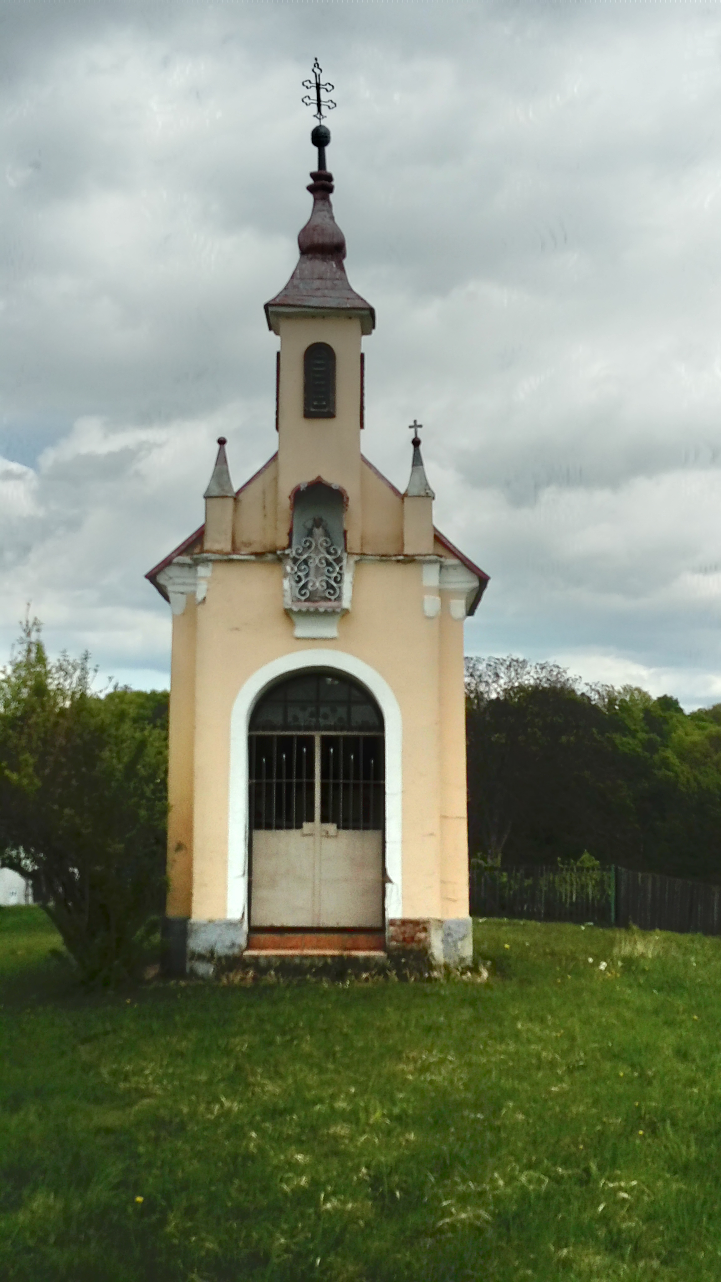 Kapelica zgrajena na začetku 20. stol.